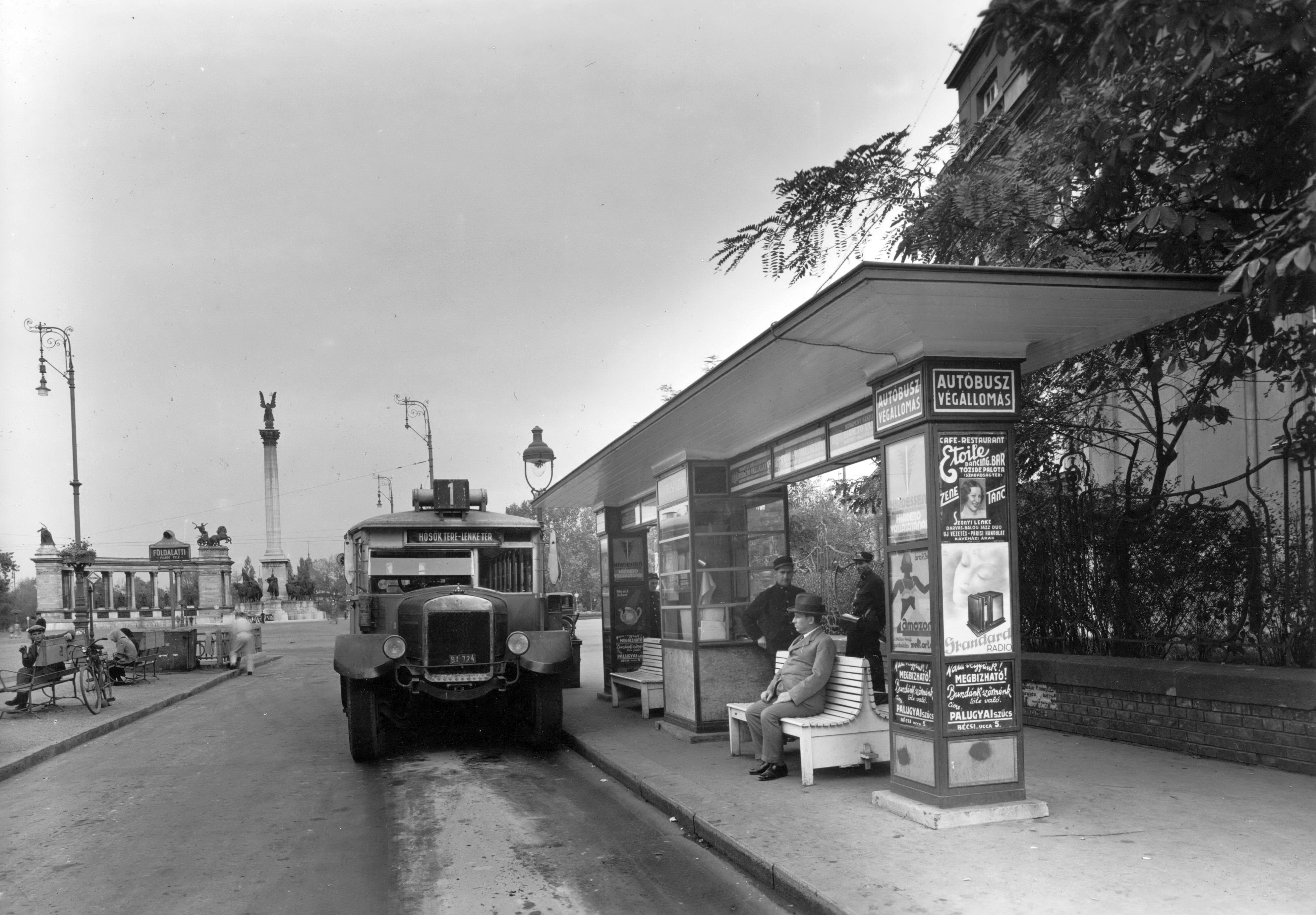 Andrássy út, háttérben a Hősök tere. Location: Hungary, Budapest VI. Tags: bus stop, ad, MÁVAG-brand, Hungarian brand, bus, transport, license, Budapest, terminus, number plate Title: Andrássy út, háttérben a Hősök tere.